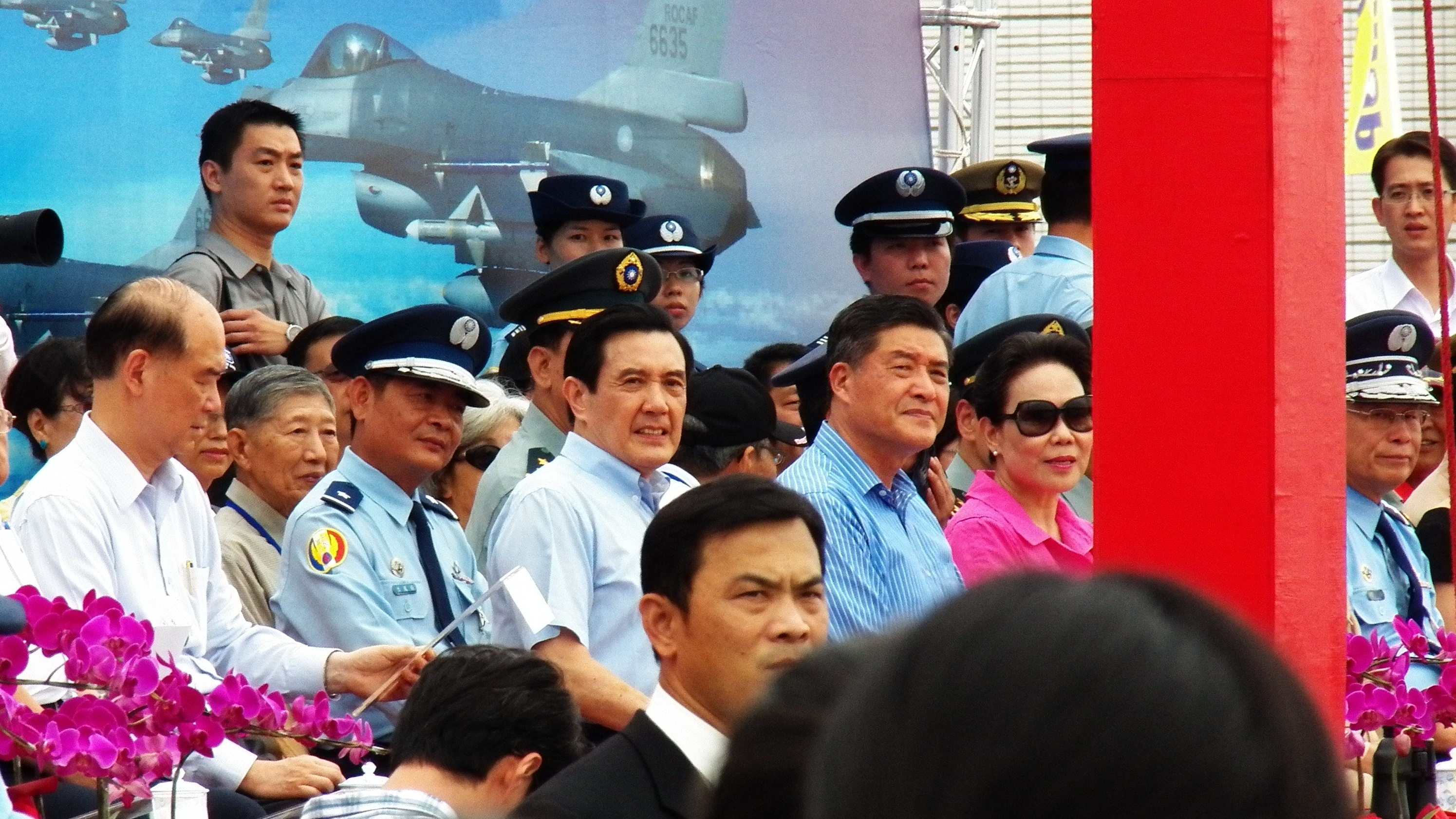 2012空軍嘉義基地營區開放活動，司令臺上的總統馬英九與國防部長高華柱（右）、空軍455聯隊聯隊長楊鳳生少將（左）；前樑右端是空軍司令嚴明上將。